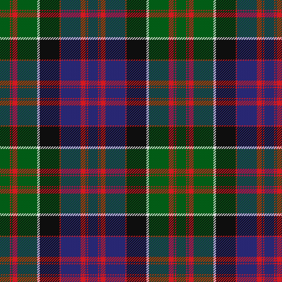 G/16 R2 G2 R8 G32 W4 K32 R2 B32 R8 B2 R2 B/16